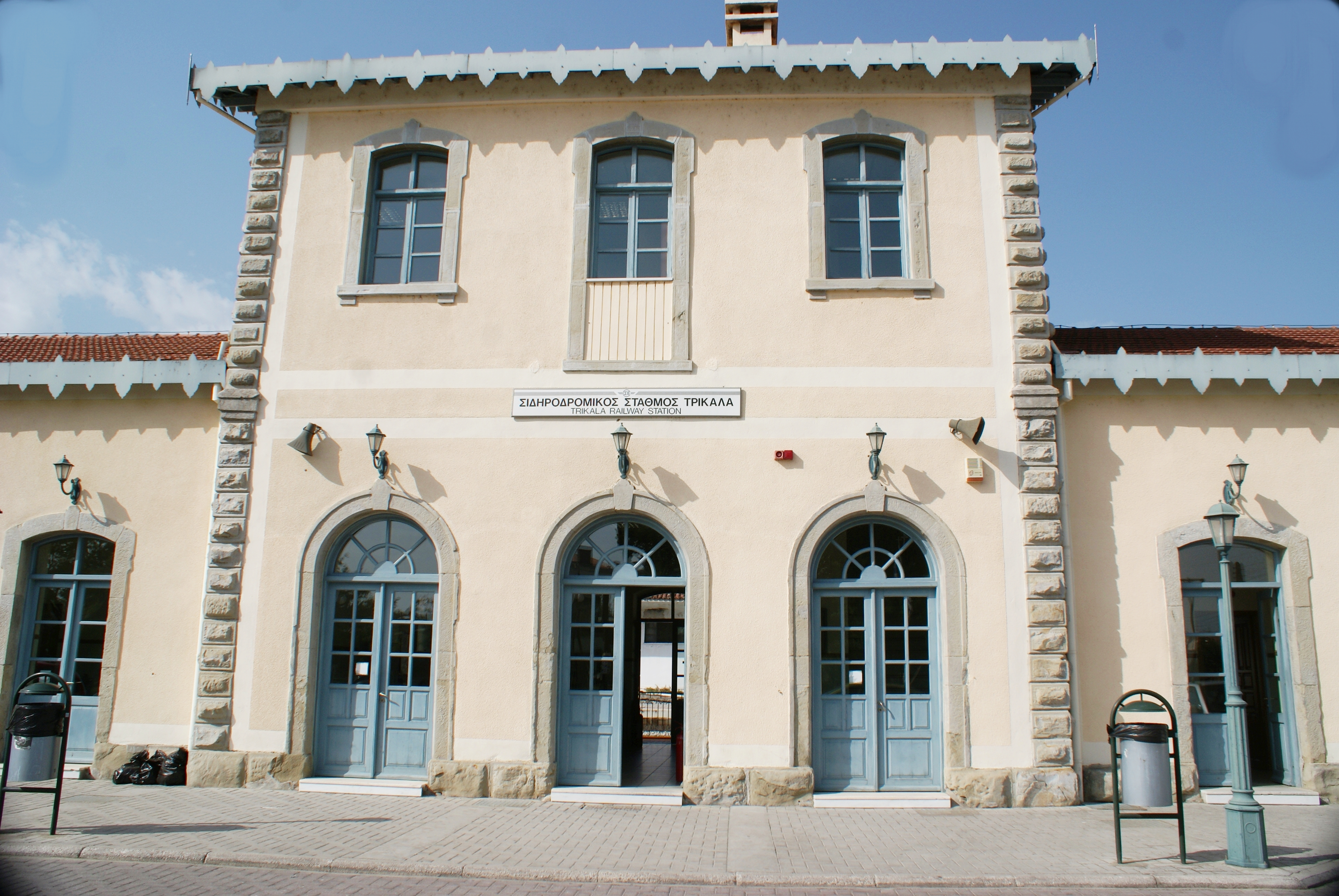 Σιδηροδρομικός Σταθμός Τρικάλων«Σιδηροδρομικός Σταθμός Τρικάλων»